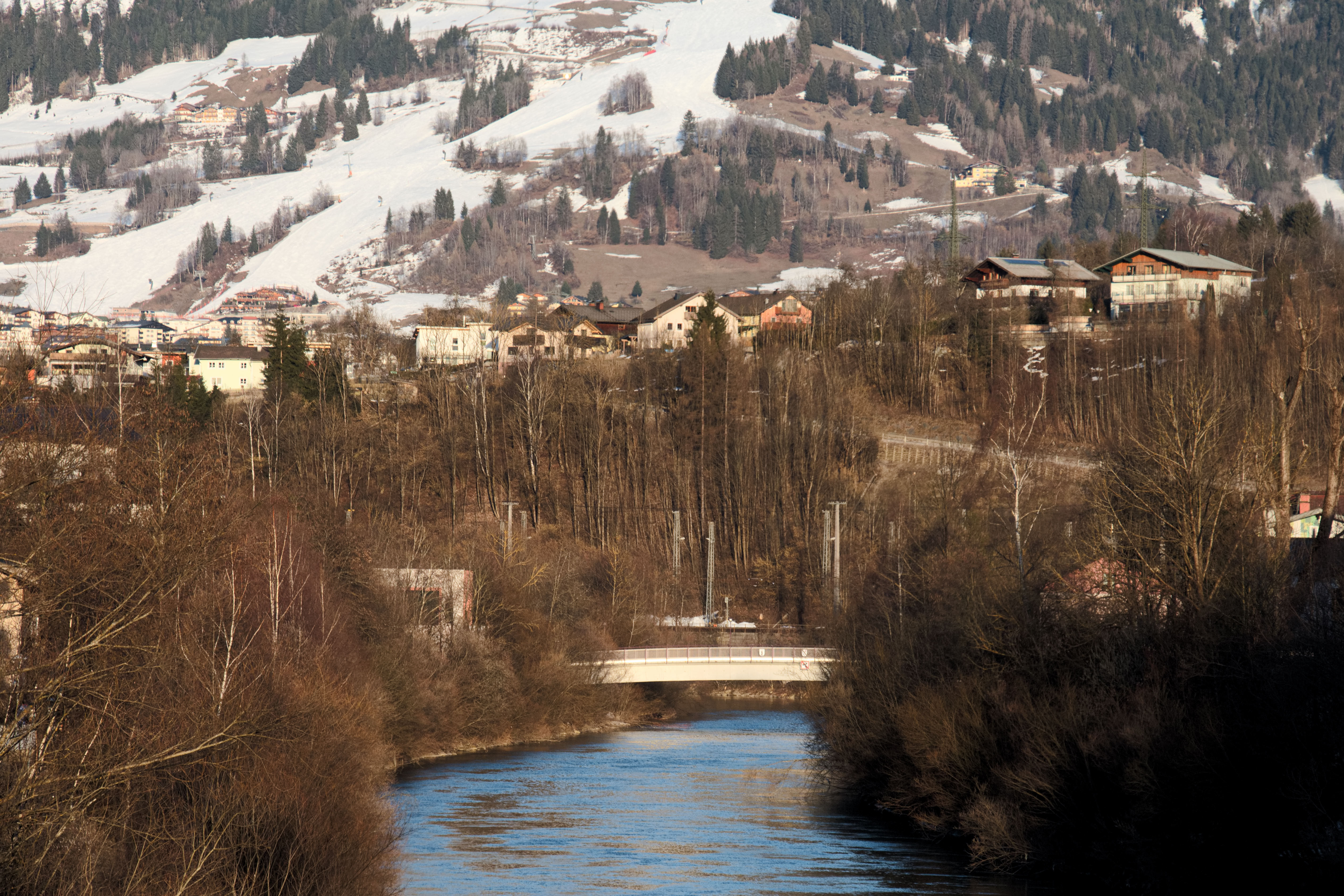 Blick über die Salzach in der Salzburger Gemeinde Schwarzach im Pongau; im Hintergrund die Fußgängerbrücke Salzachdsteg Ost.